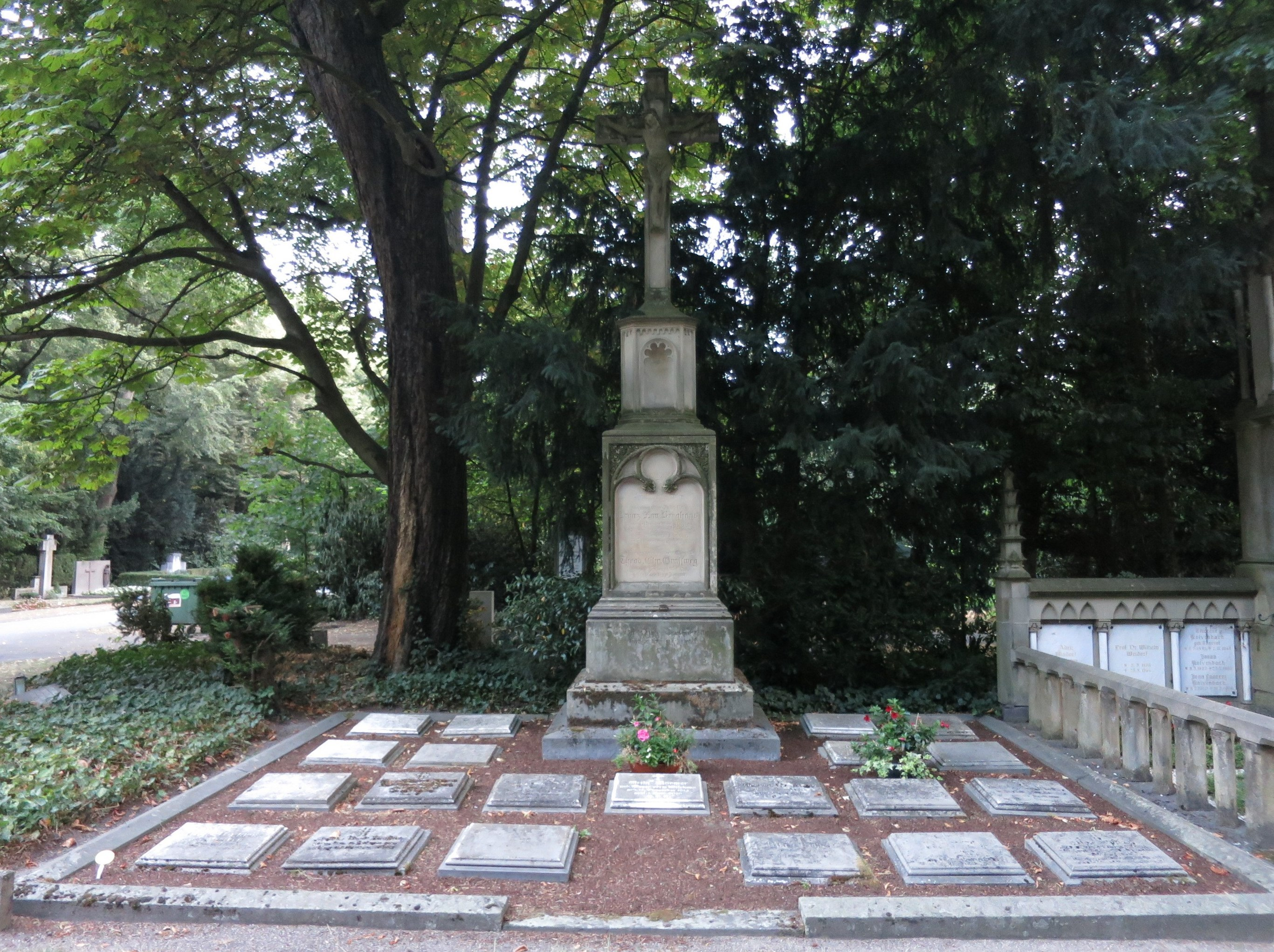 Max Wallraf - Grab auf Melaten-Friedhof